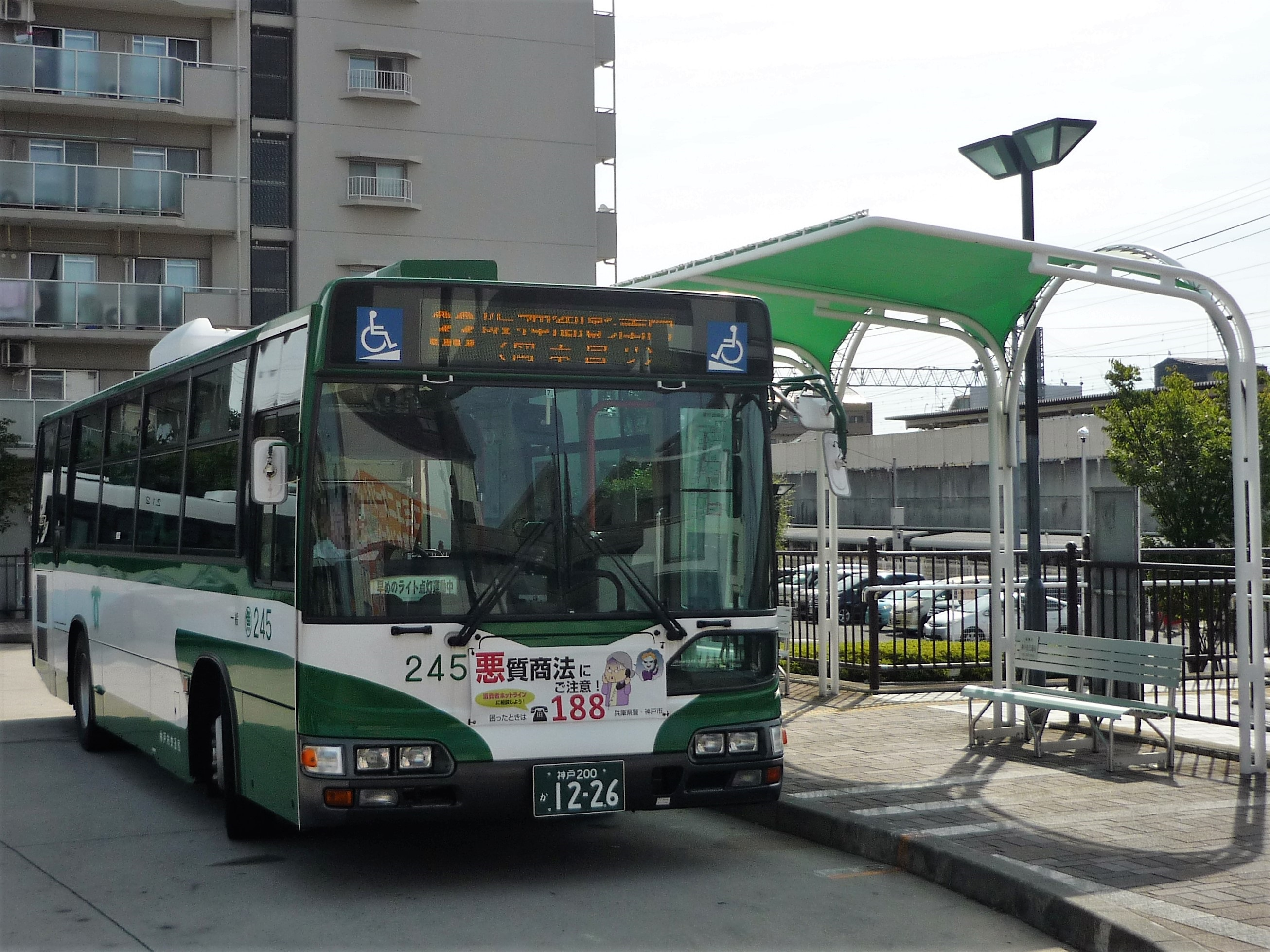 甲南山手駅前に停車中の神戸市バス33系統